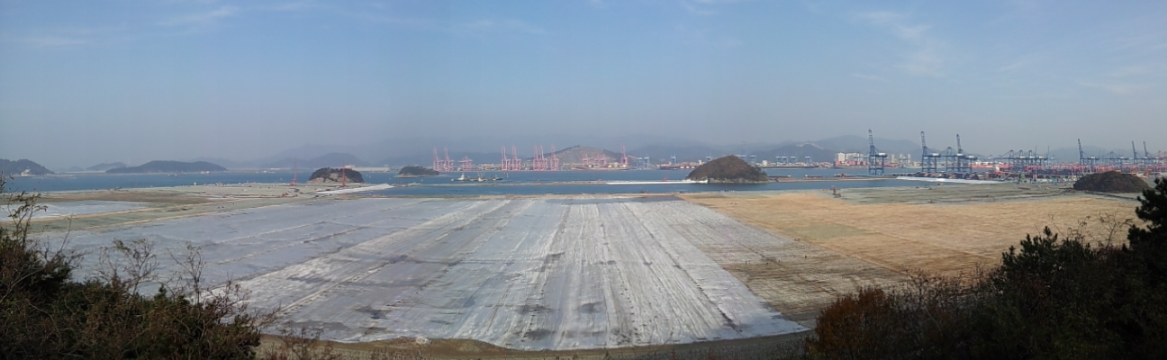 부산 신항만 건설현장 파노라마